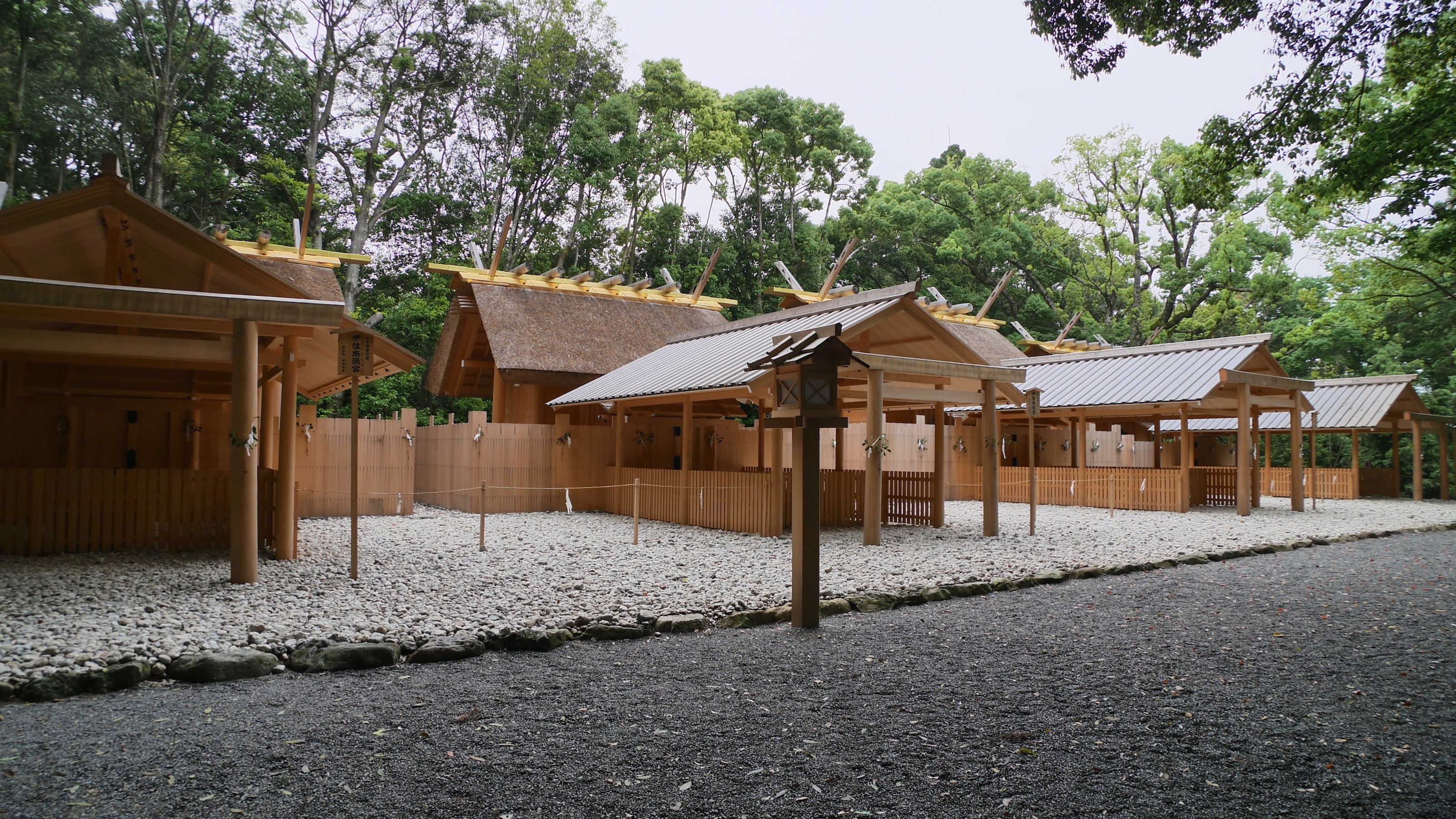 日本の三重県伊勢市にある皇大神宮別宮月読宮の社殿。